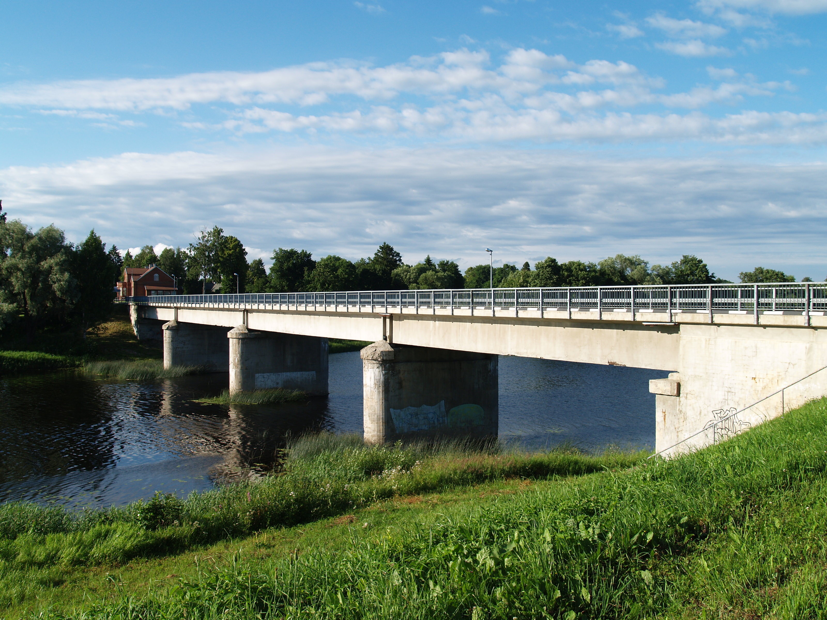 Tori sild kirikupoolsest küljest